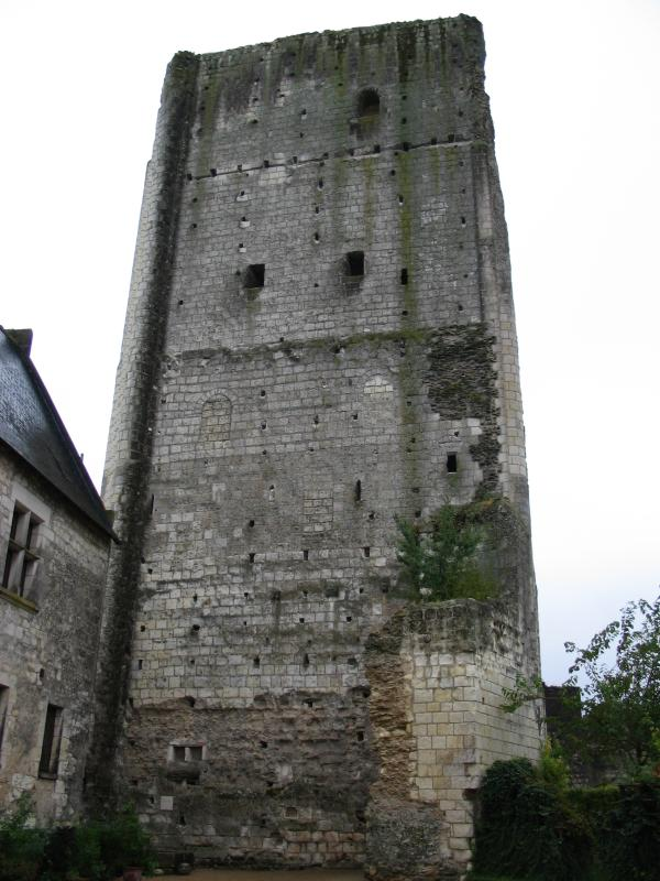 Donjon - Chateau du Loches, France